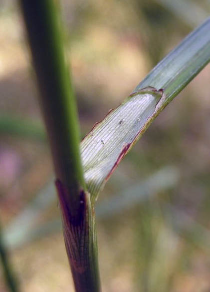 Blattscheide des Schmalblättrigen Wollgrases Eriophorum angustifolium, Horster Moor